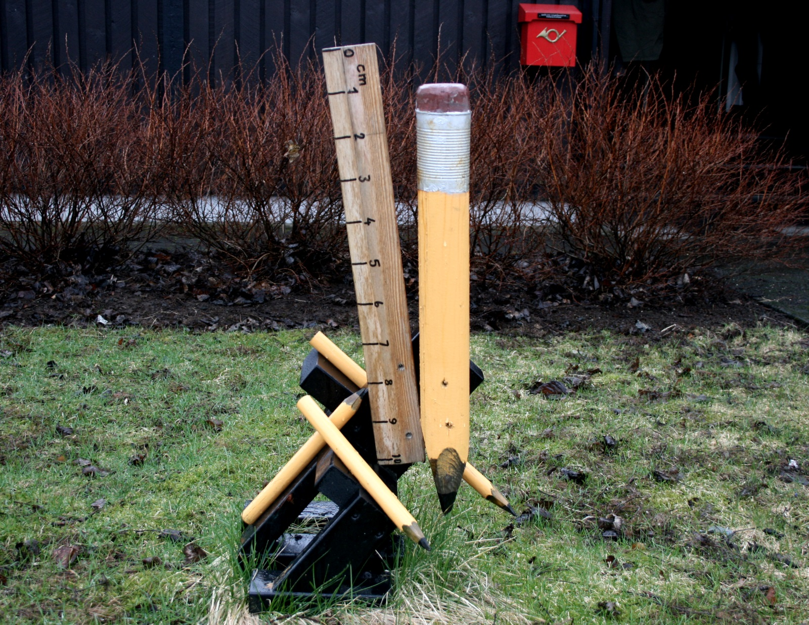 Uppstilling eftir Ólaf Th Ólafsson